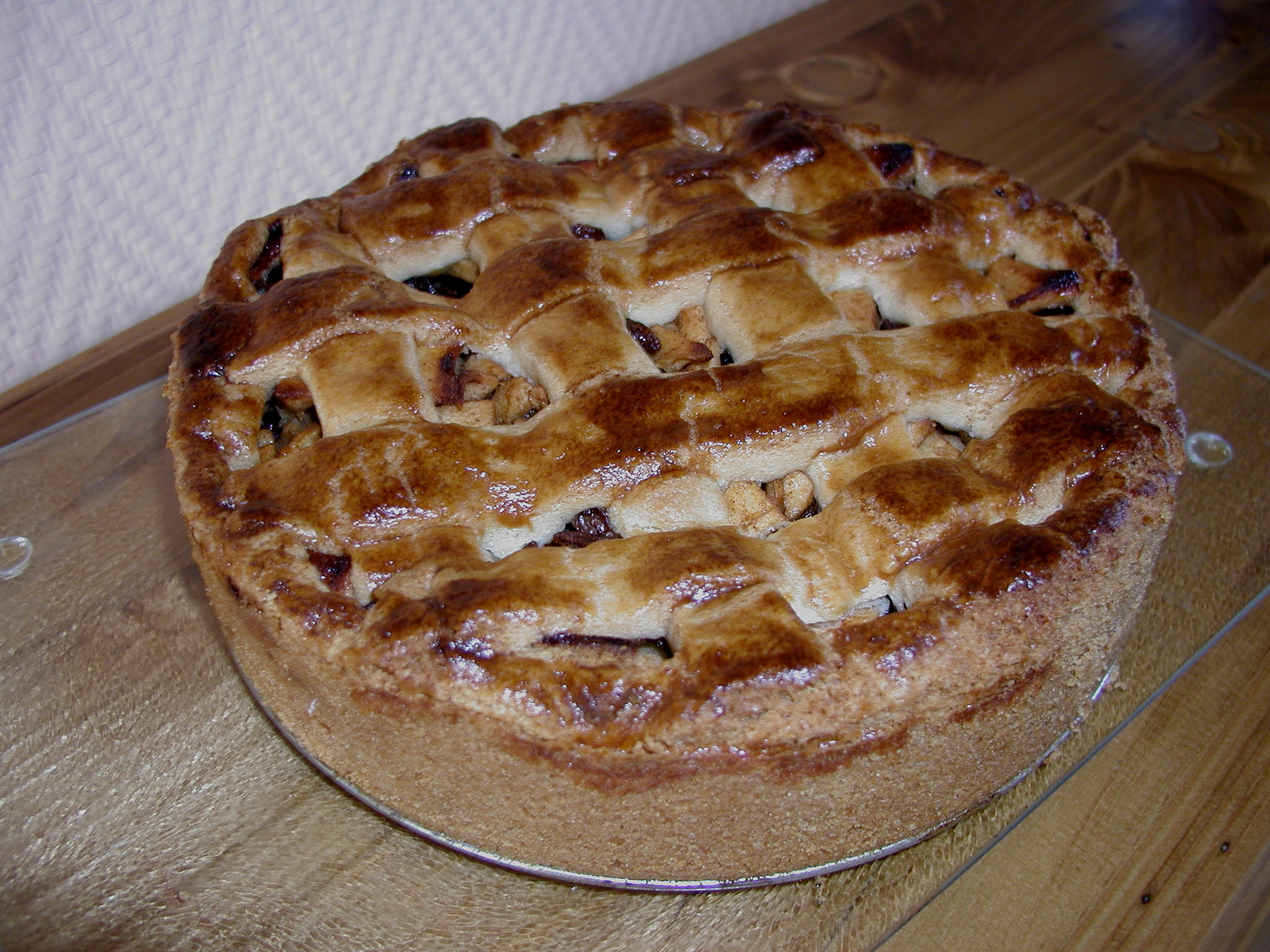 Holländischer Apfelkuchen